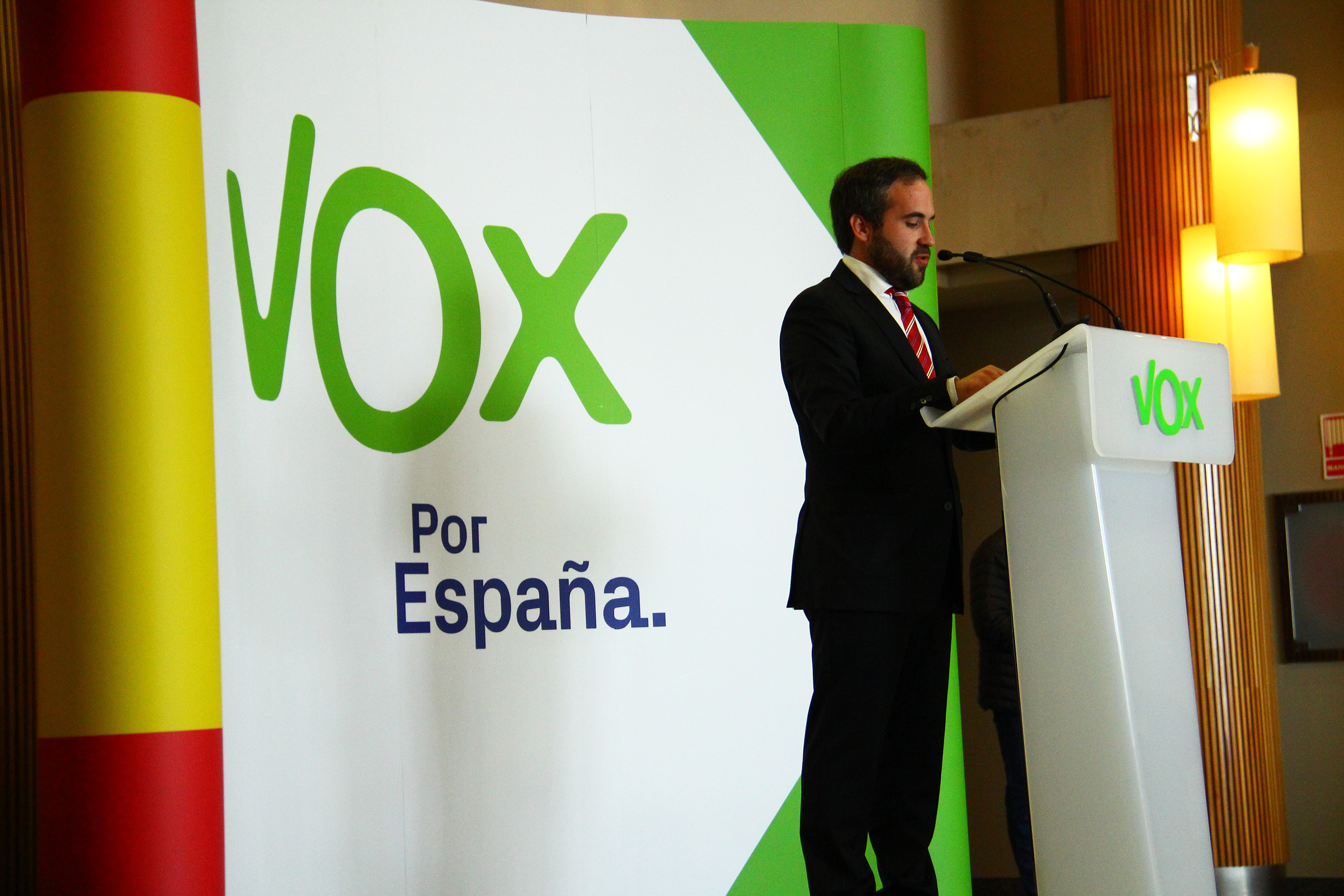 Presentación de Vox en la ciudad de Vigo (Galicia, España) el 14 de abril de 2019, con la participación de la dirigente nacional del partido Rocío Monasterio, María de los Ángeles Romero, cabeza de lista de Vox para el Senado por la provincia de Pontevedra, y el General de División Antonio Budiño, cabeza de lista para el Congreso.